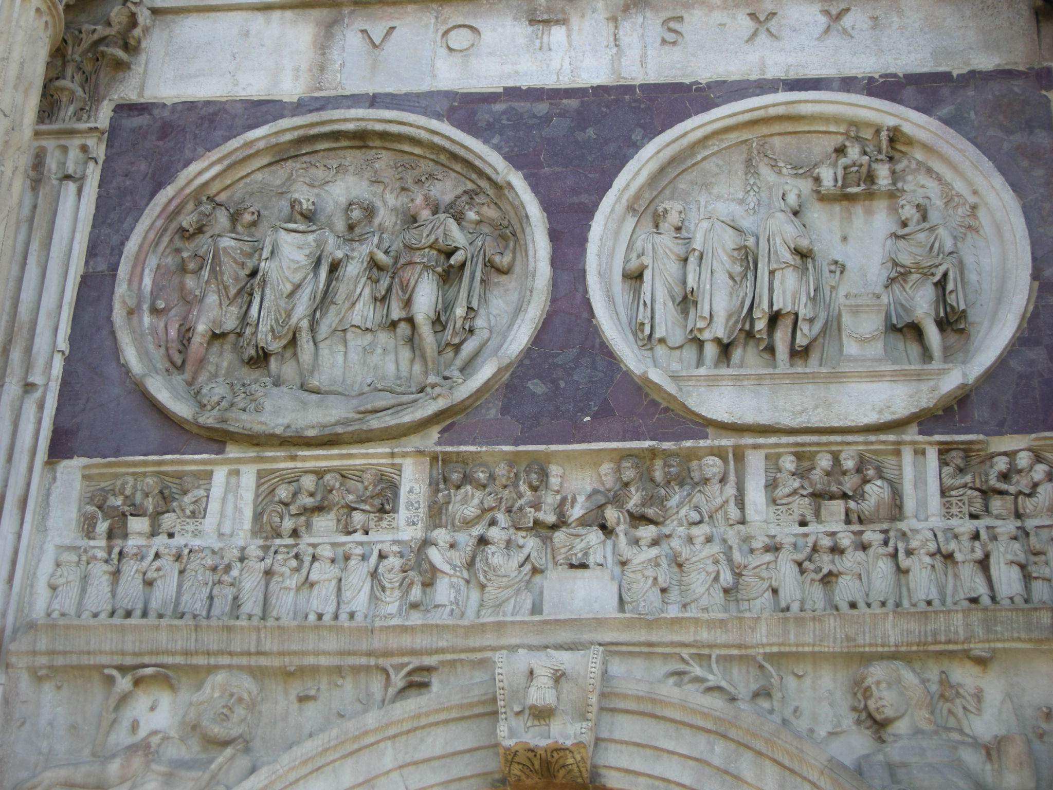 Arco di costantino, tondi